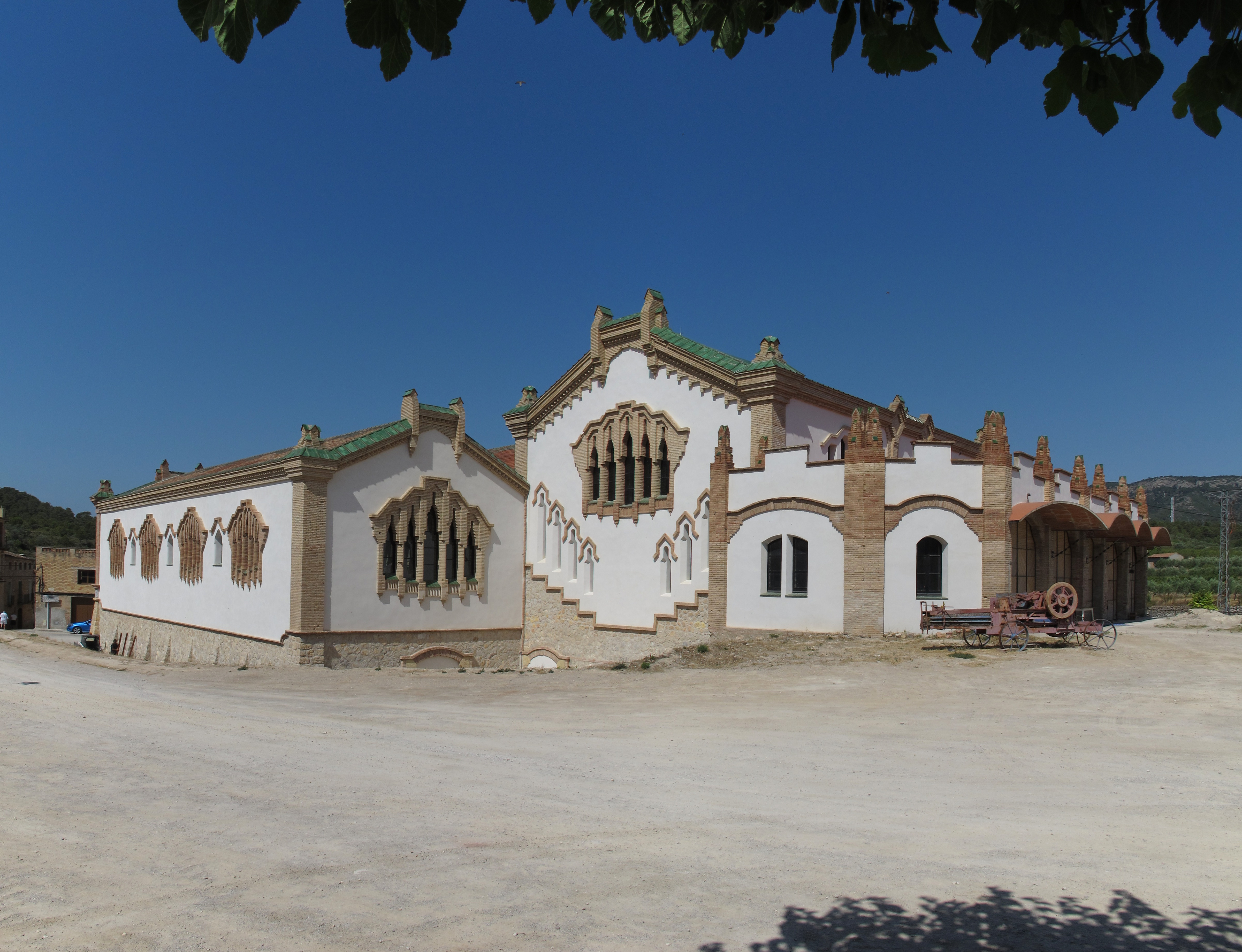 El Pinell de Brai (Katalonien, Spanien): Celler Cooperatiu (Weinkellerei der Genossenschaft), Rückseite